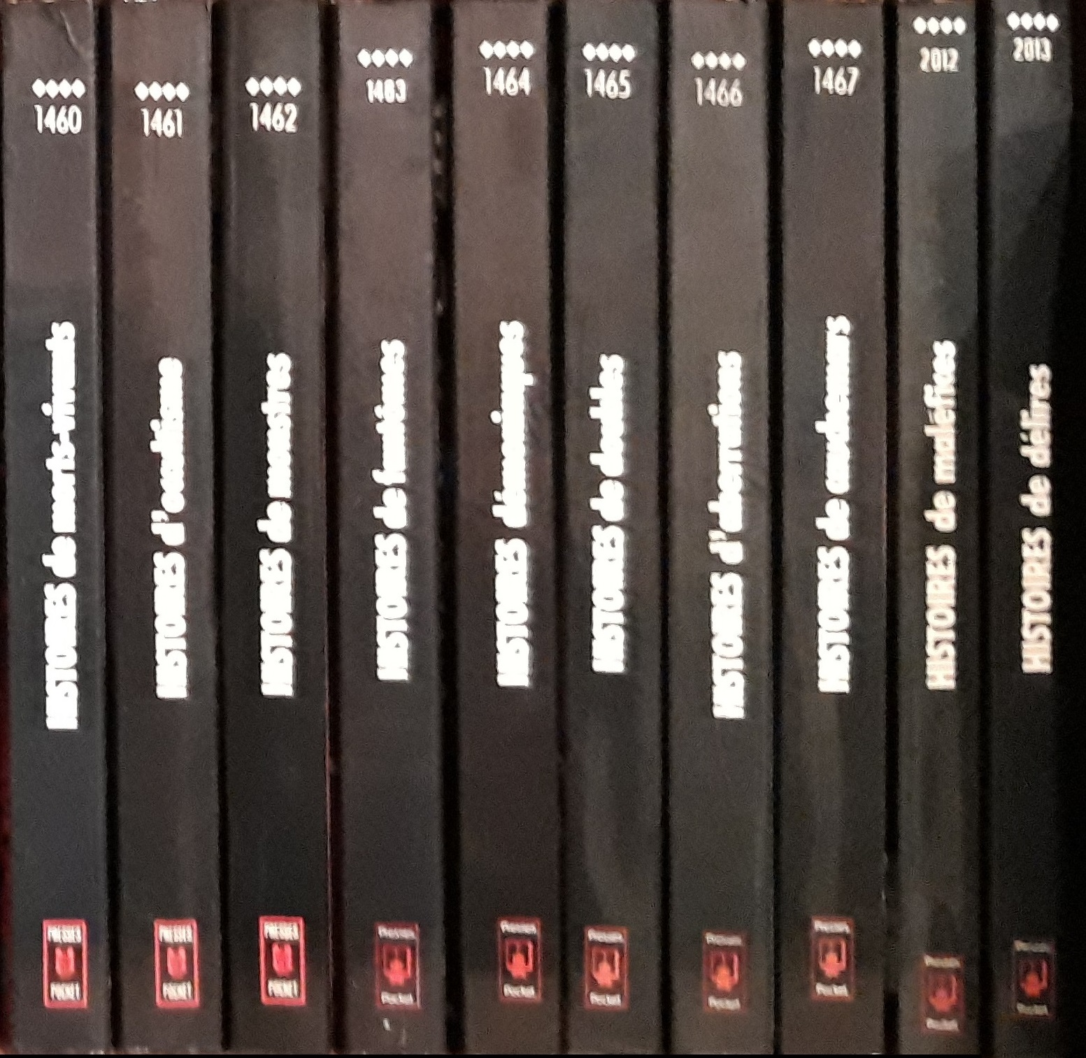 Coll. Fantastique Presses Pocket, débuts 80'.